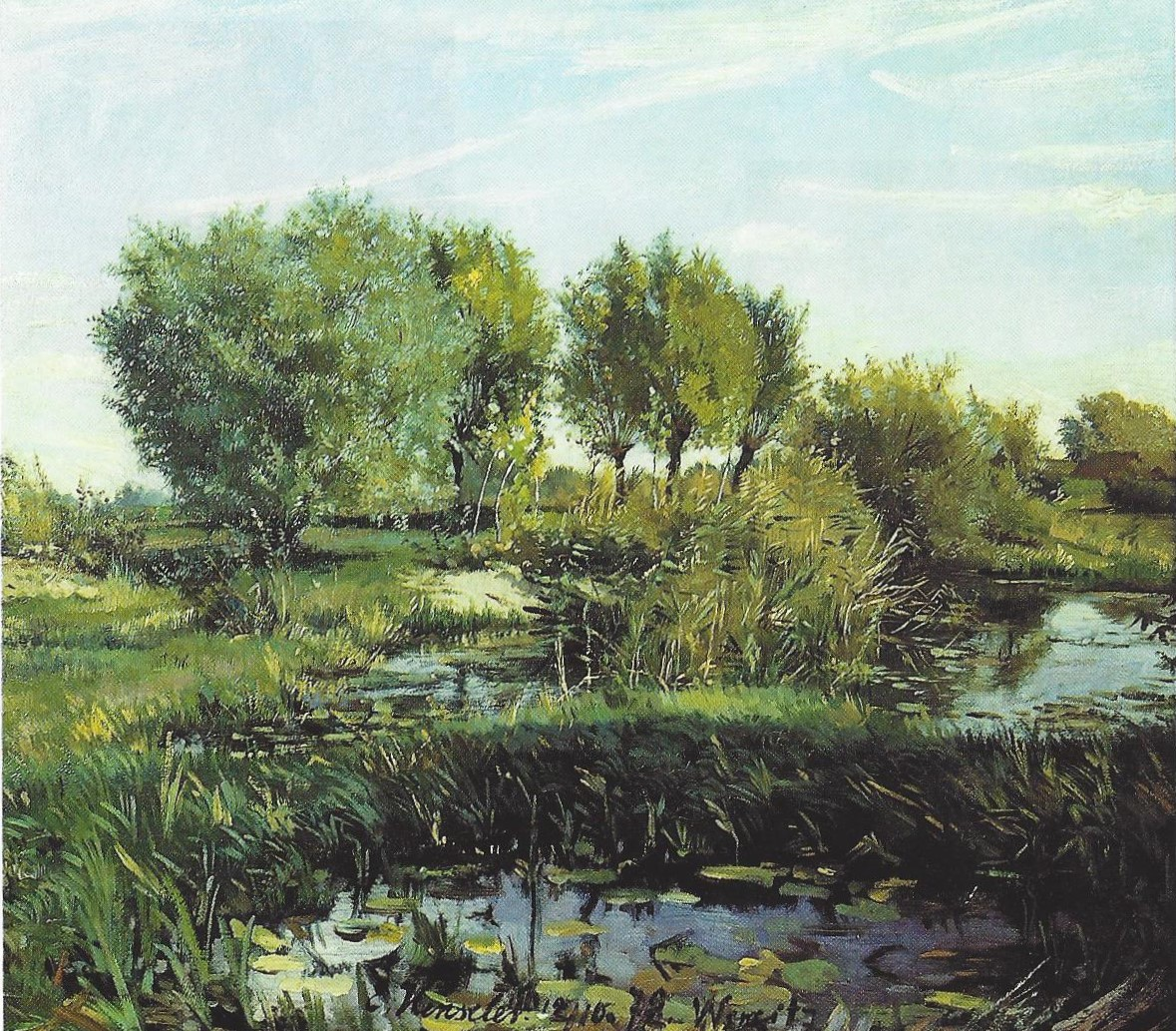 Ölbild „Die alte Warthe“